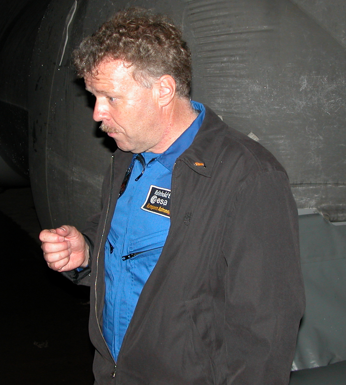 Source = Own Work Author = Bruno Barral (ByB)